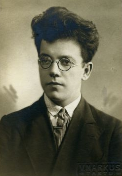 Johannes Selliov